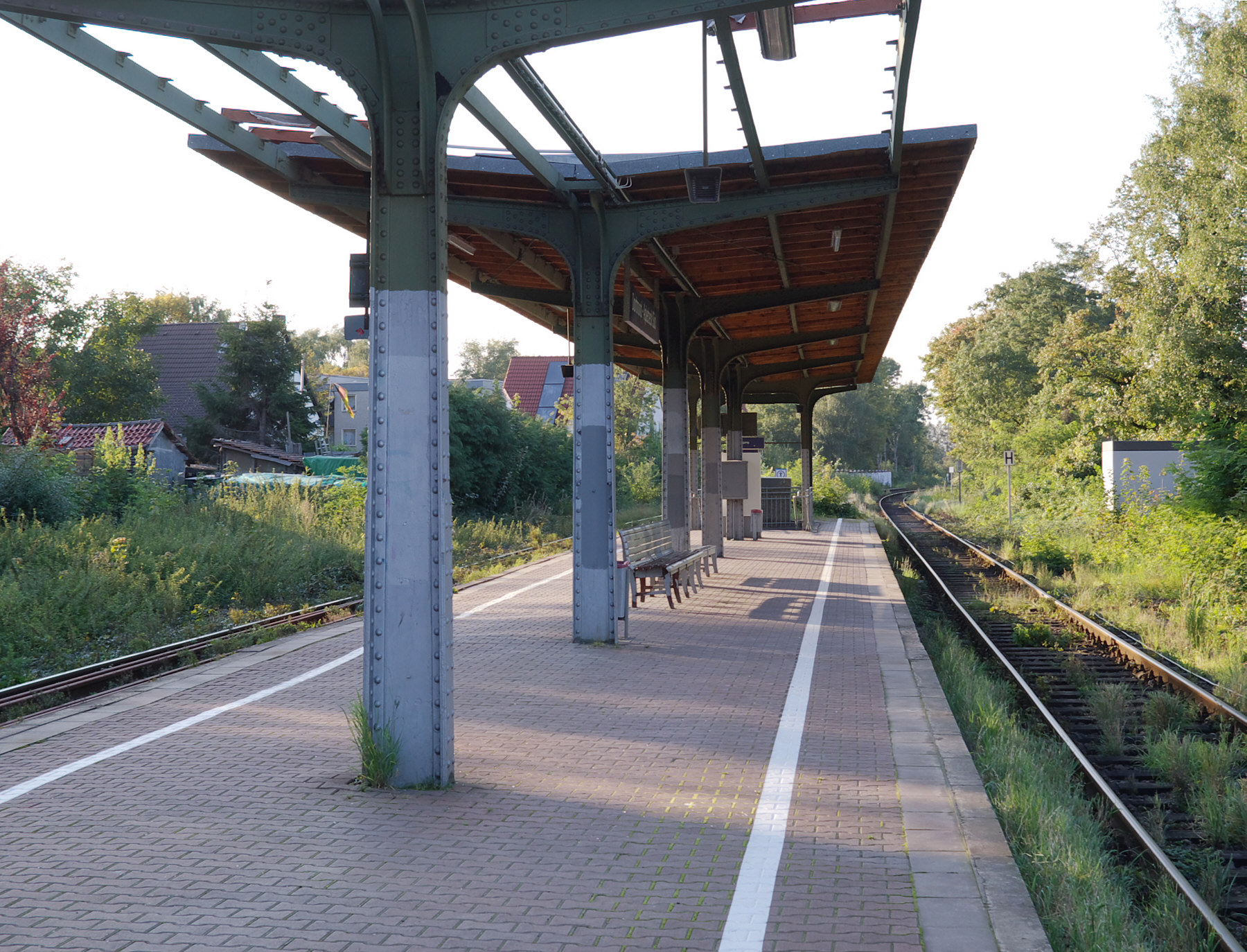 Bahnhof Dortmund-Aplerbeck Süd